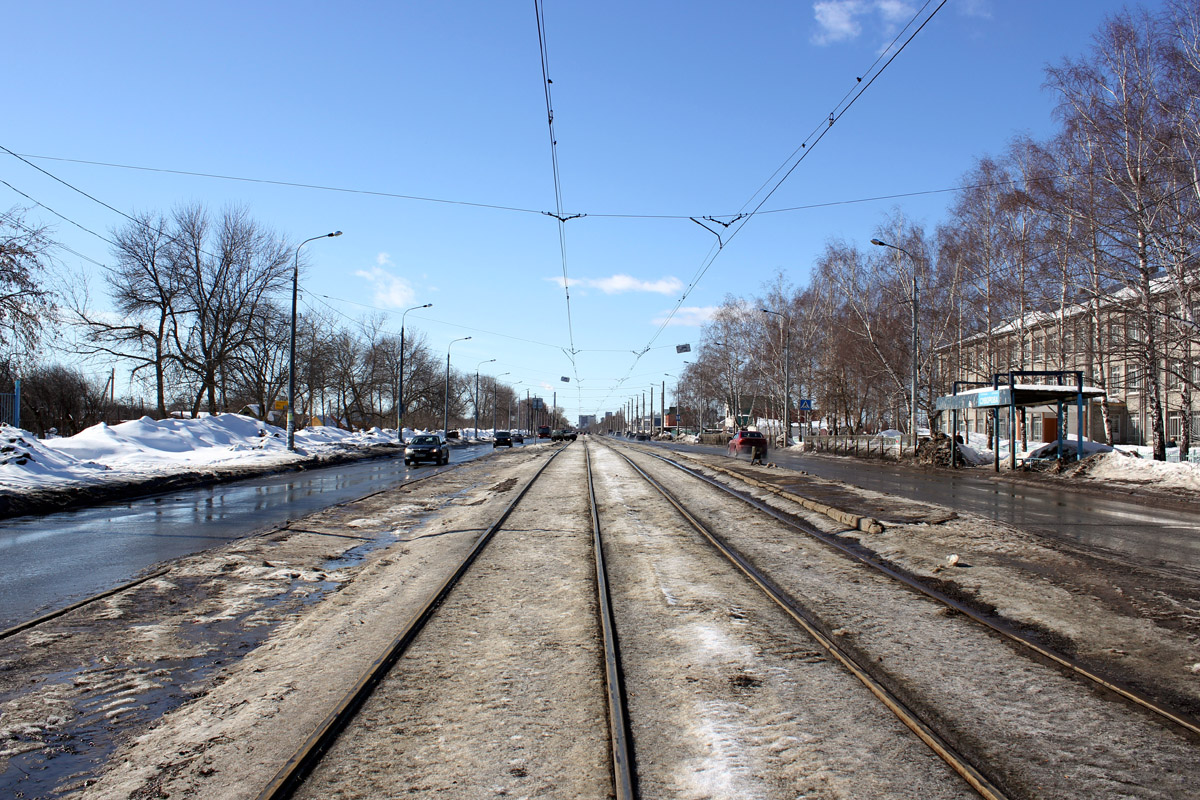 Казань, улица Беломорская